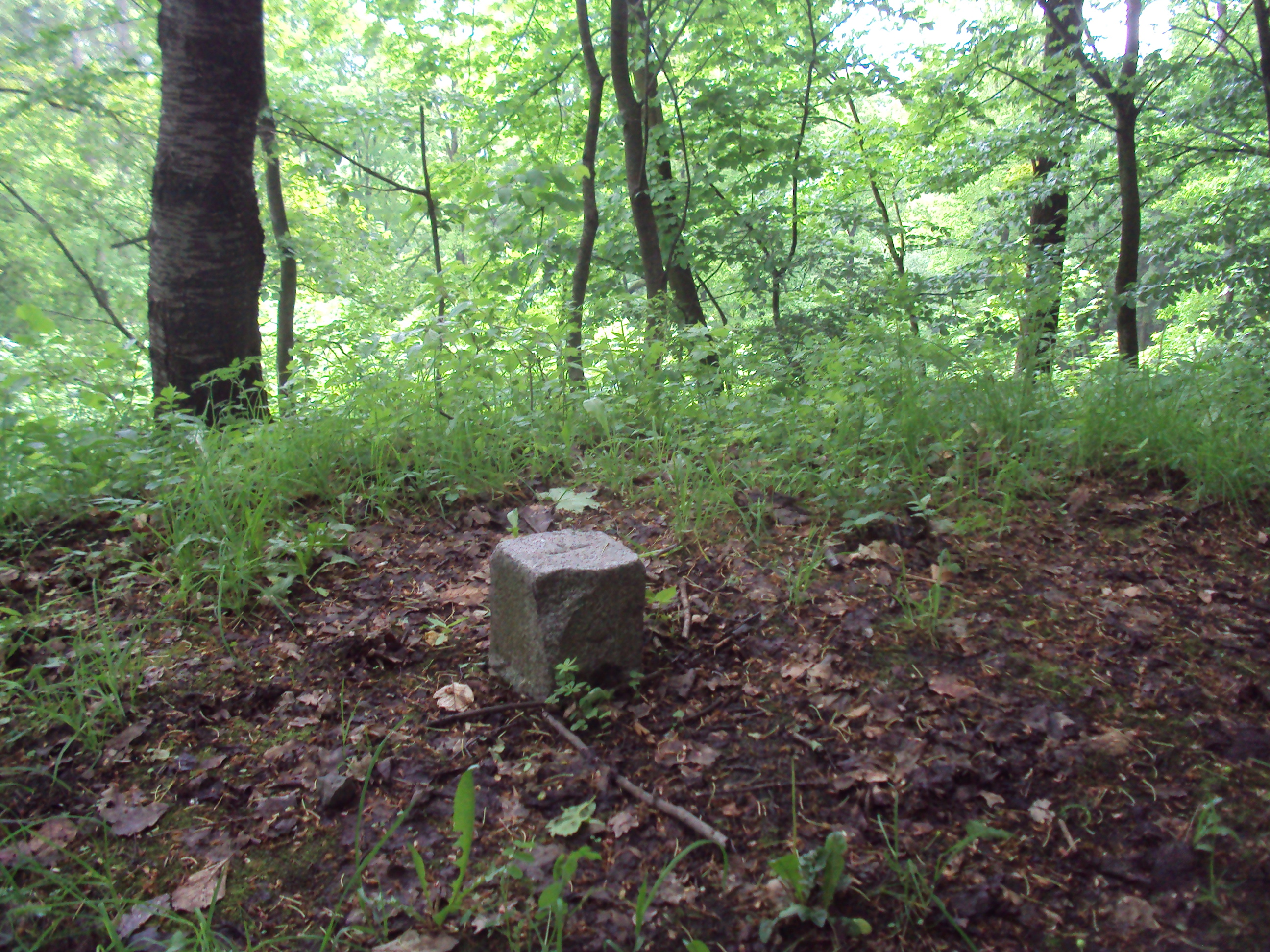 Vrcholový kámen